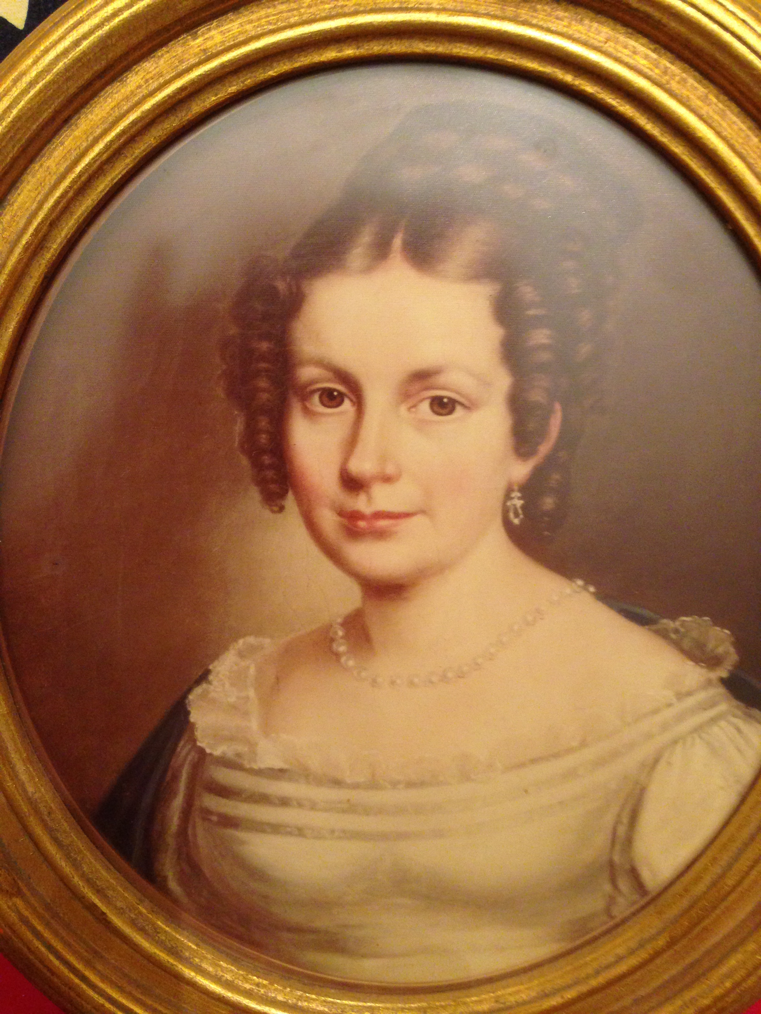 Ölgemälde von Johanna Maria Hotzen